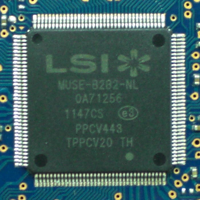 LSI公司的硬碟控制晶片MUSE-B282-NL OA71256 1147CS